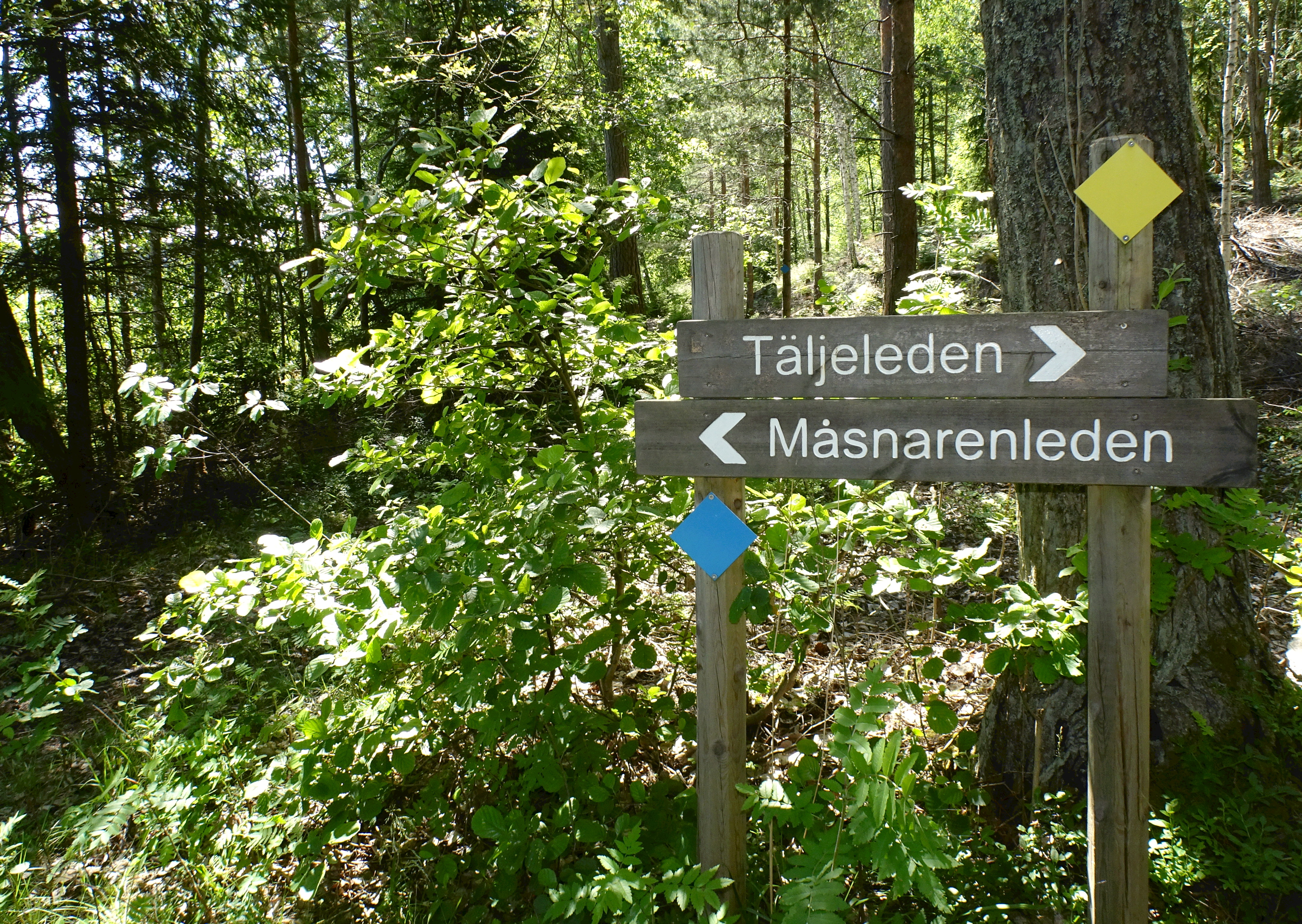 Skyltar Måsnarenleden, Täljeleden